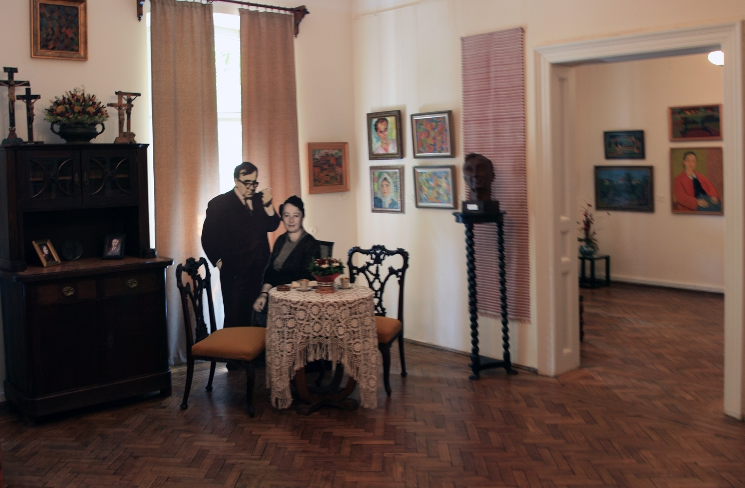 Художественно-мемориальный музей Леопольда Левицкого во Львове